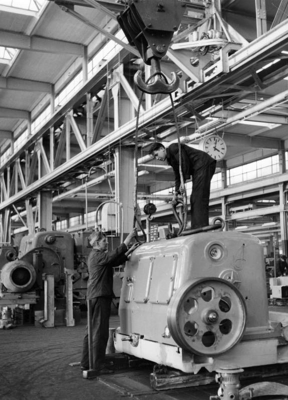 März 1955 Frankfurt/Main Schleifmaschinen-Fabrik Naxos